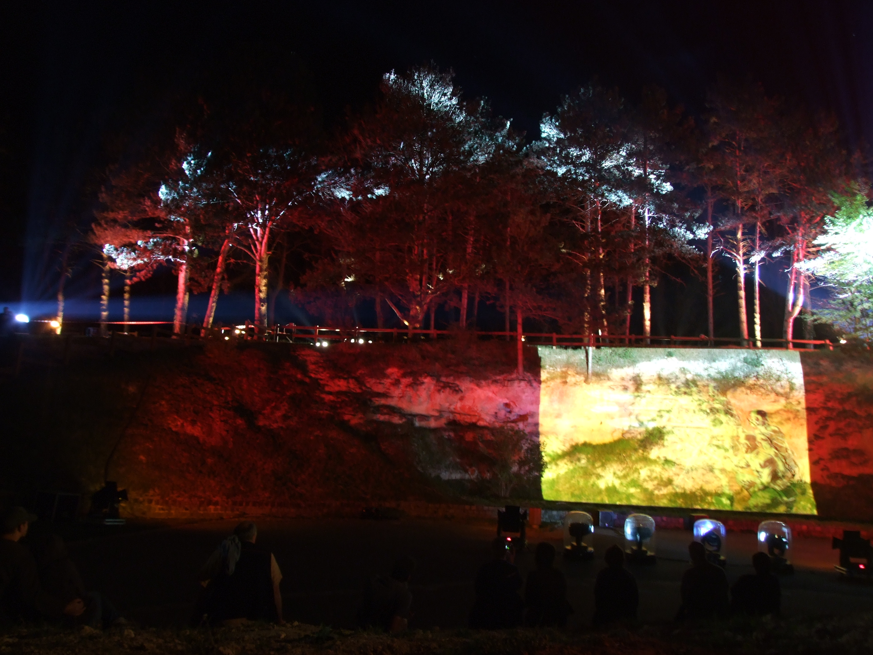 Spectacle Dernière nuit